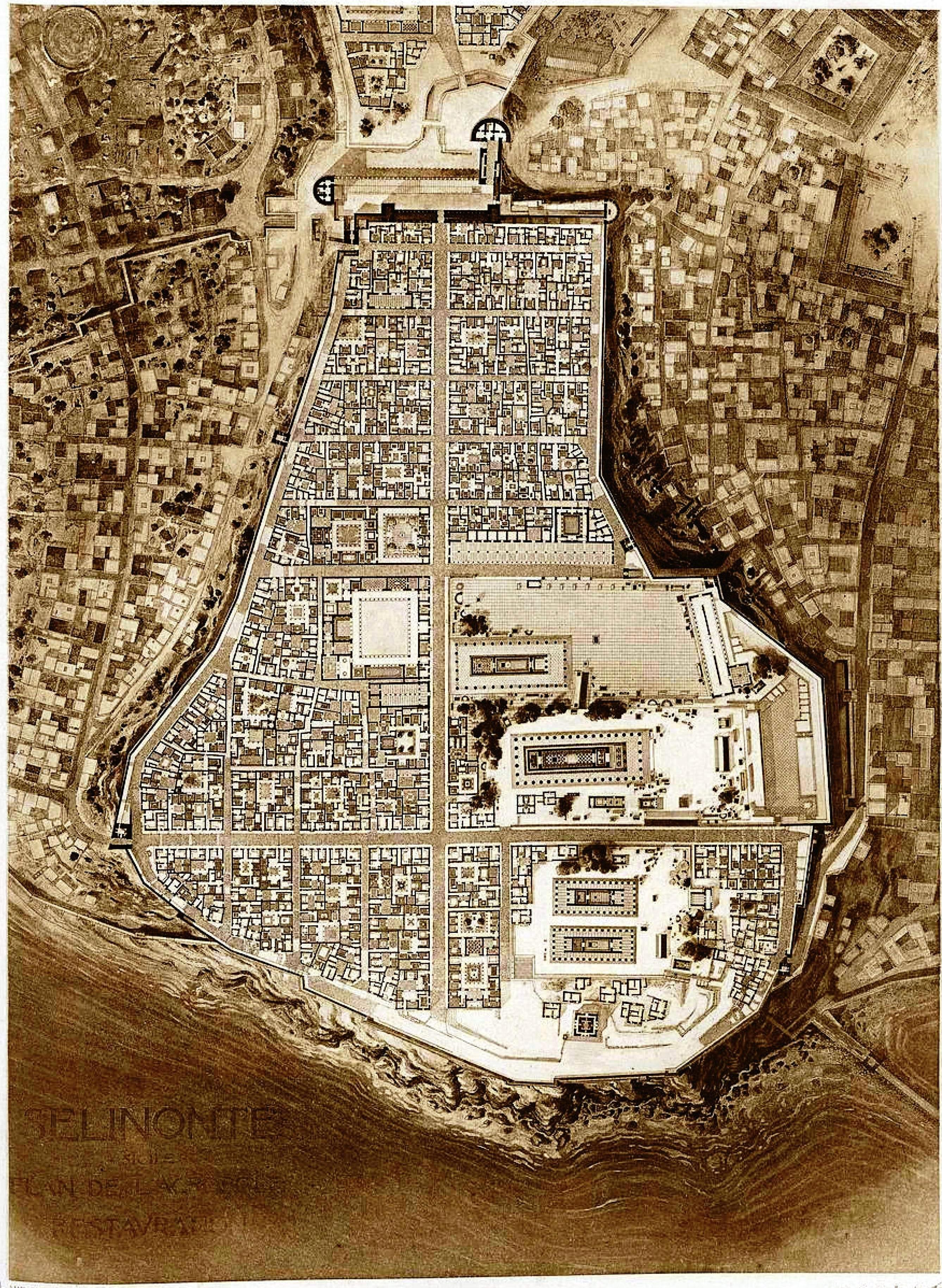 Stadtplanung der historischen Stadt